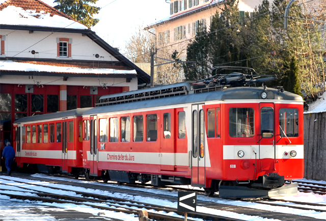 Chemins de fer du Jura (CJ) treinstel BDe 4/4 608 op 2 februari 2007 te Saignelégier